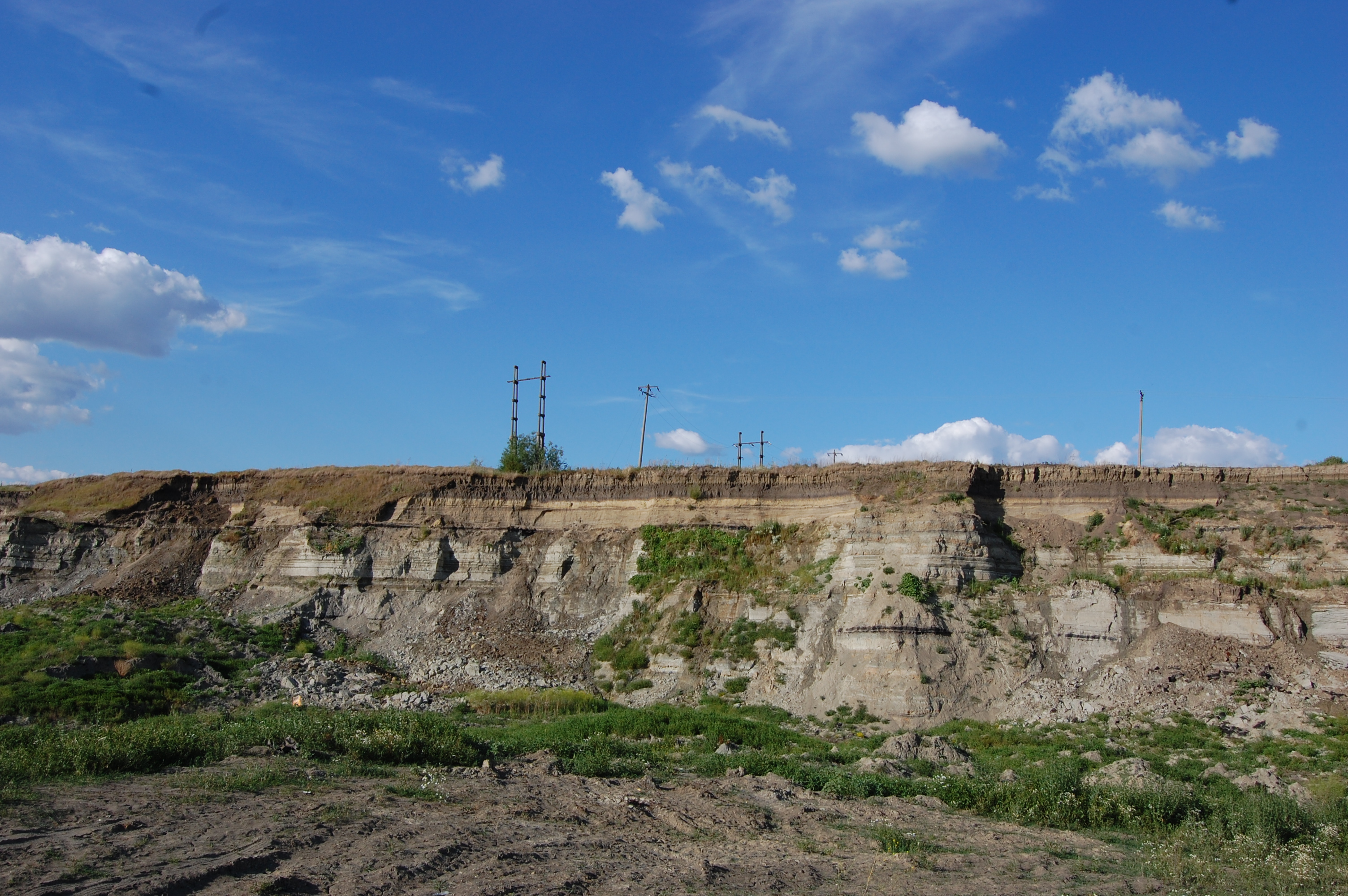 Külszíni szénfejtés Sarmaság (Románia) mellett.